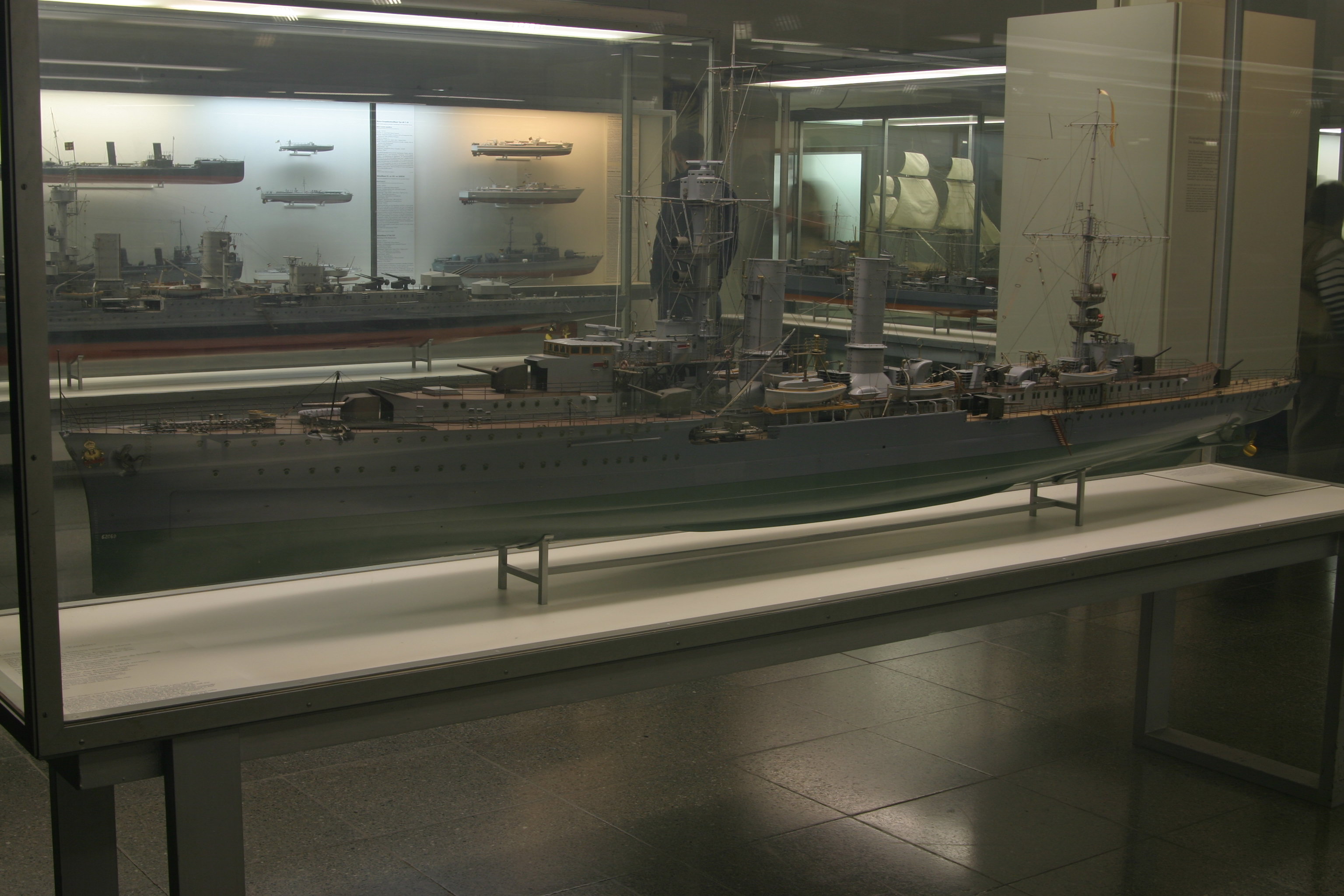 Leichter Kreuzer Emden im Modell